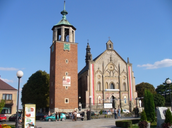 Proszowice, kościół pw. św. Jana Chrzciciela